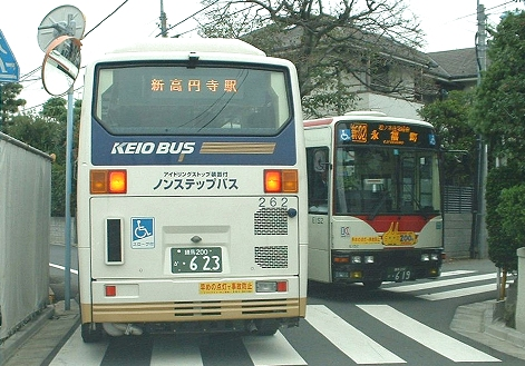 matsunoki bus line in tokyo